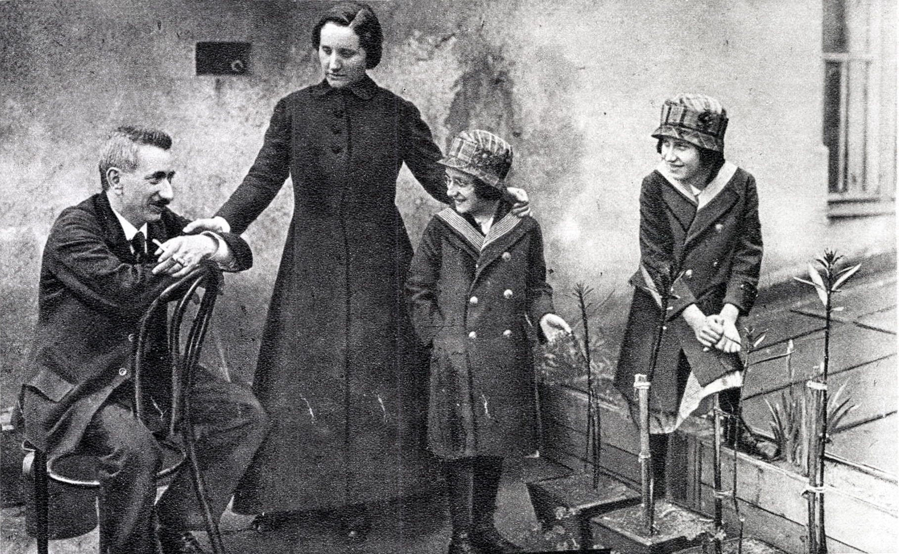 Weltner Jakab a feleségével és a lányaival